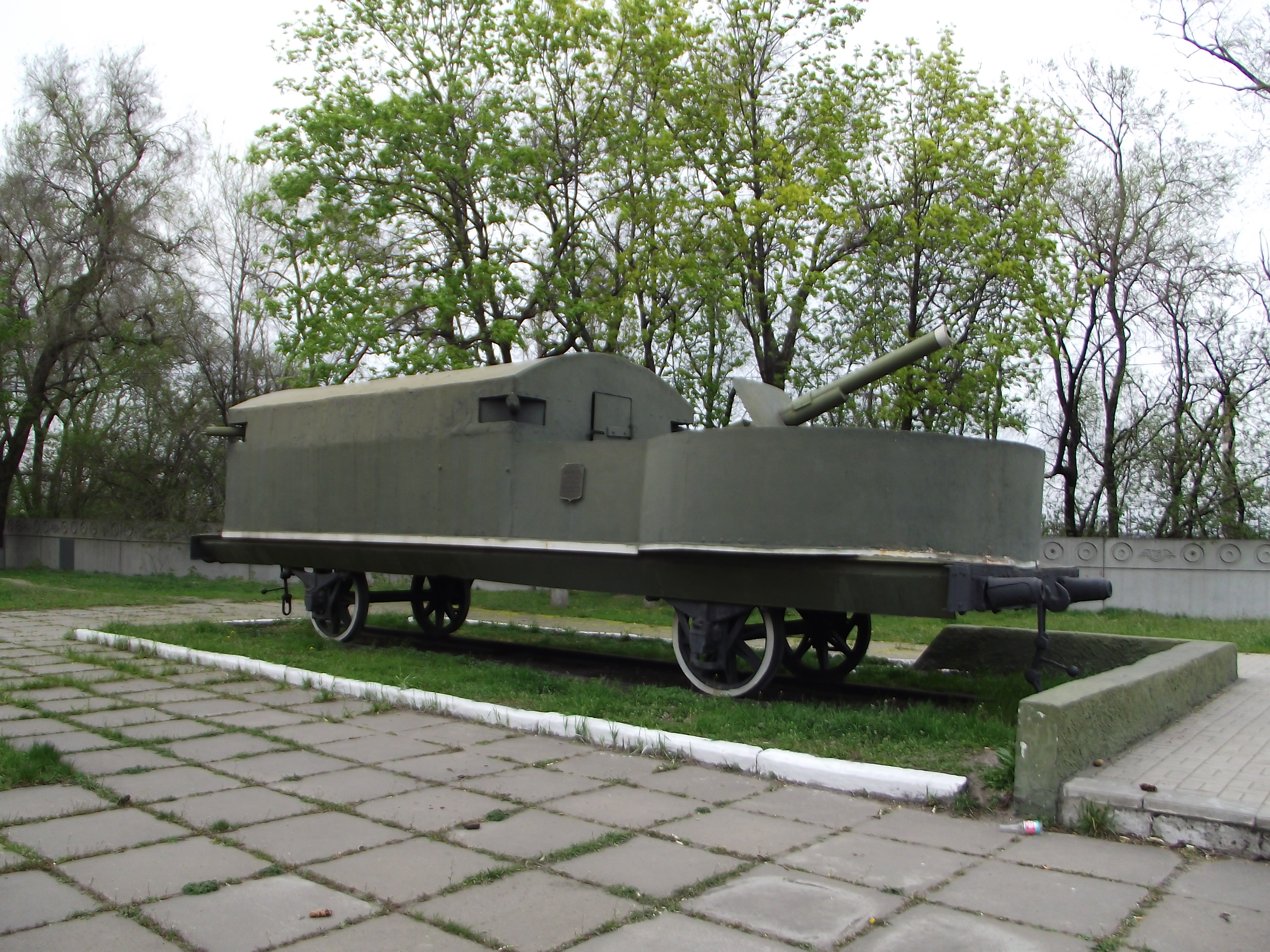 Бронеплощадка бронепоїзда, яка була побудована робітниками Брянського заводу у 1918 р., що приймав участь у боях за радянську владу в Україні та Поволжі (1918-1920 рр.), Дніпропетровськ, Калініна просп., 47